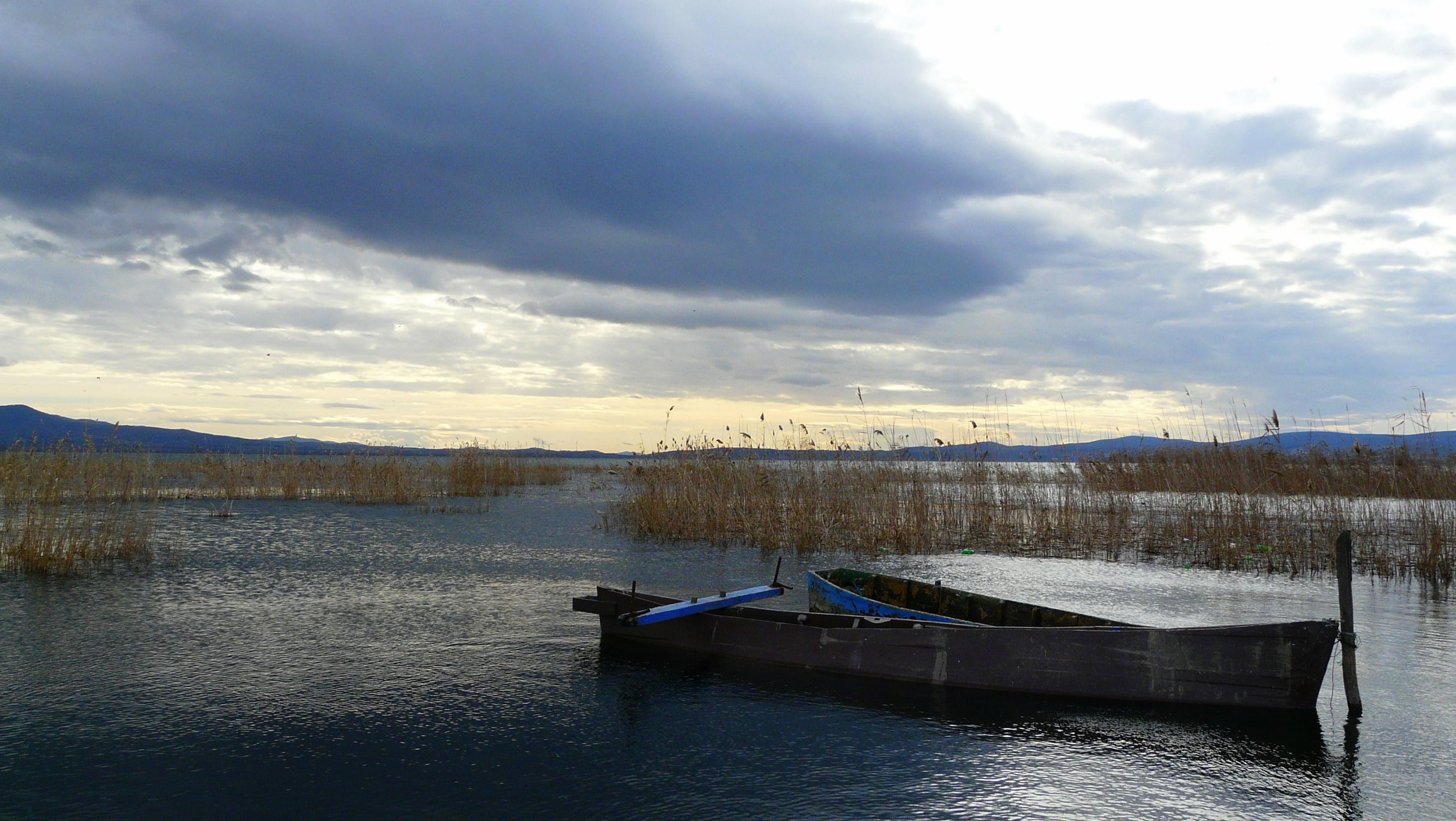 Lake Dojran,Macedonia